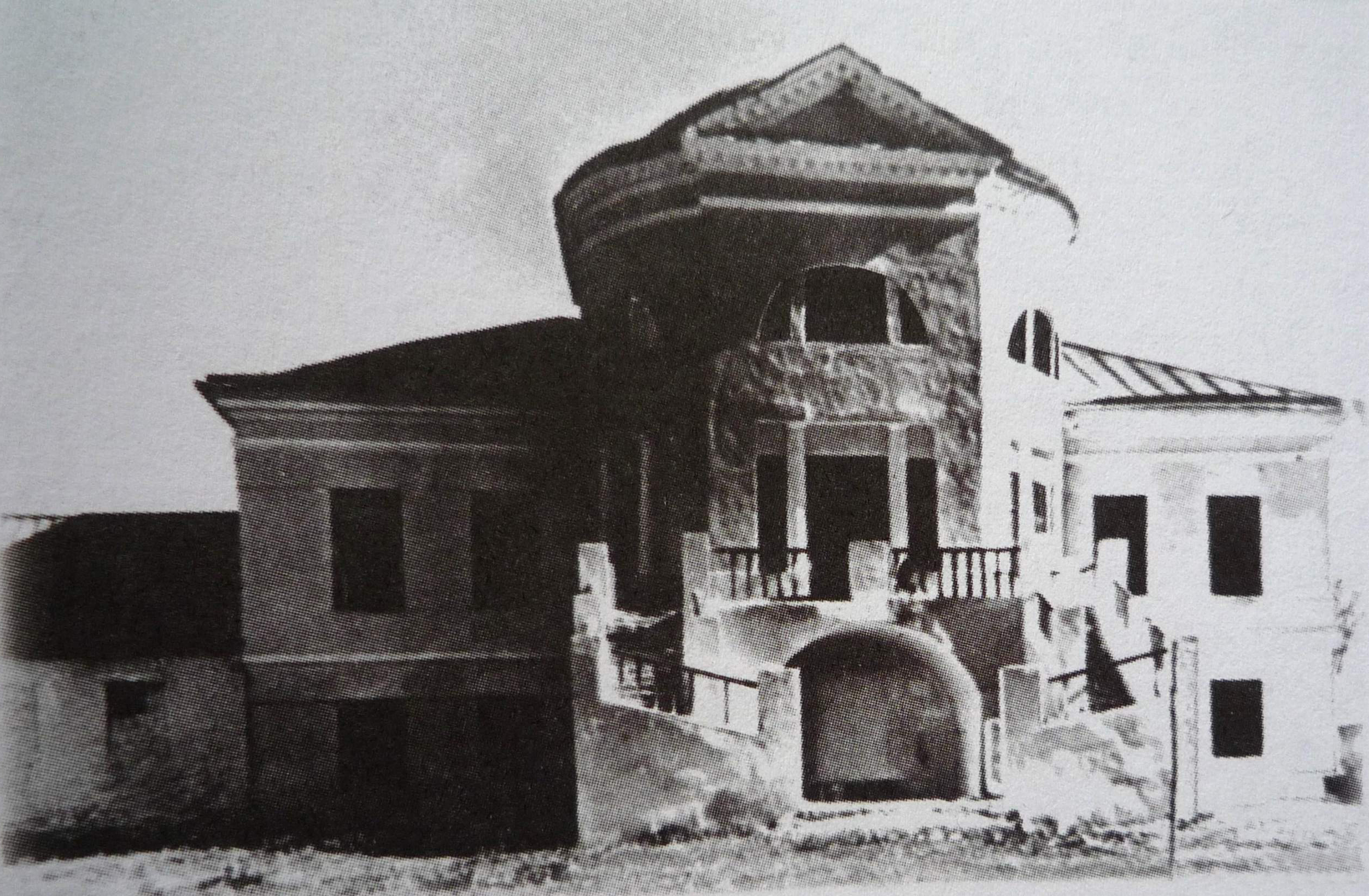 Довоенное фото «барского дома» в Горожанке (Рамонский район, Воронежская обл., Россия).